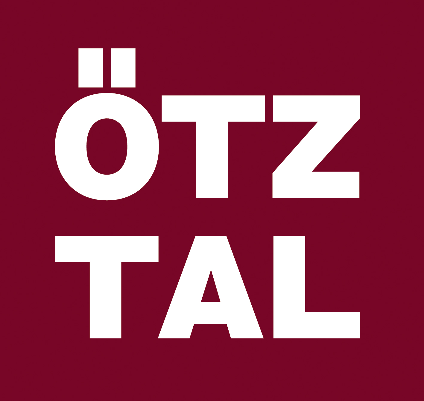 Offizielles Logo Ötztal / Oetztal / Oetztvalley